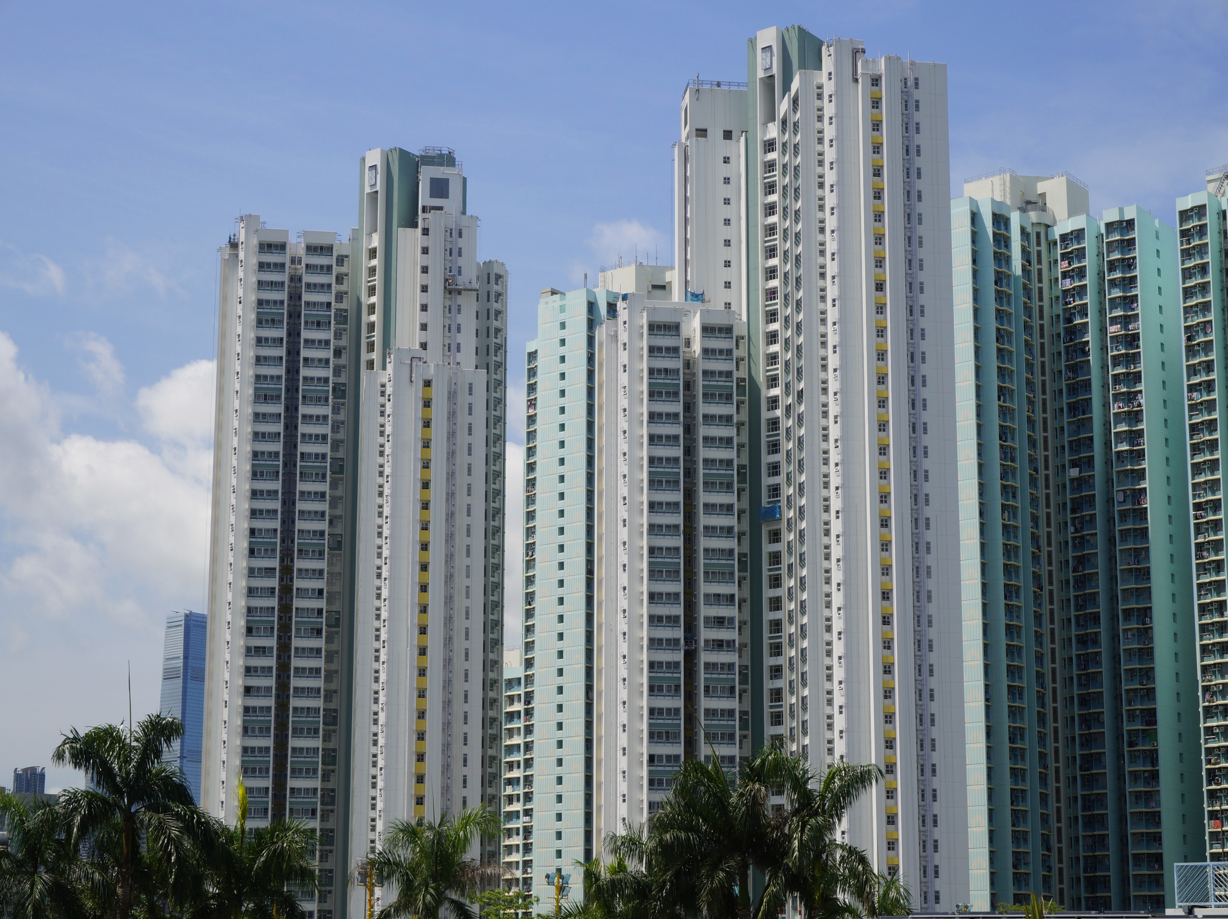 榮昌邨部分單位設有露台